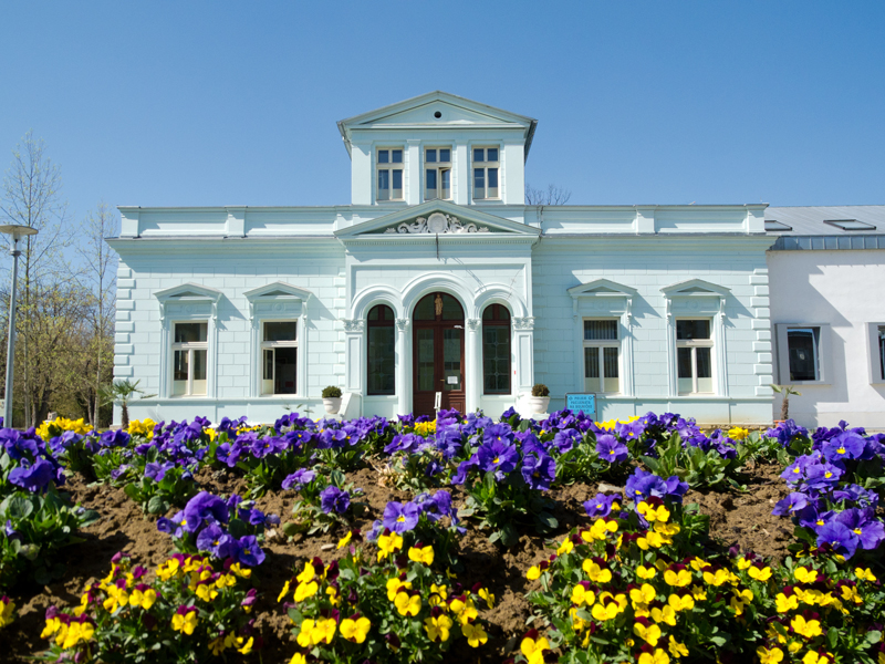 Lipik